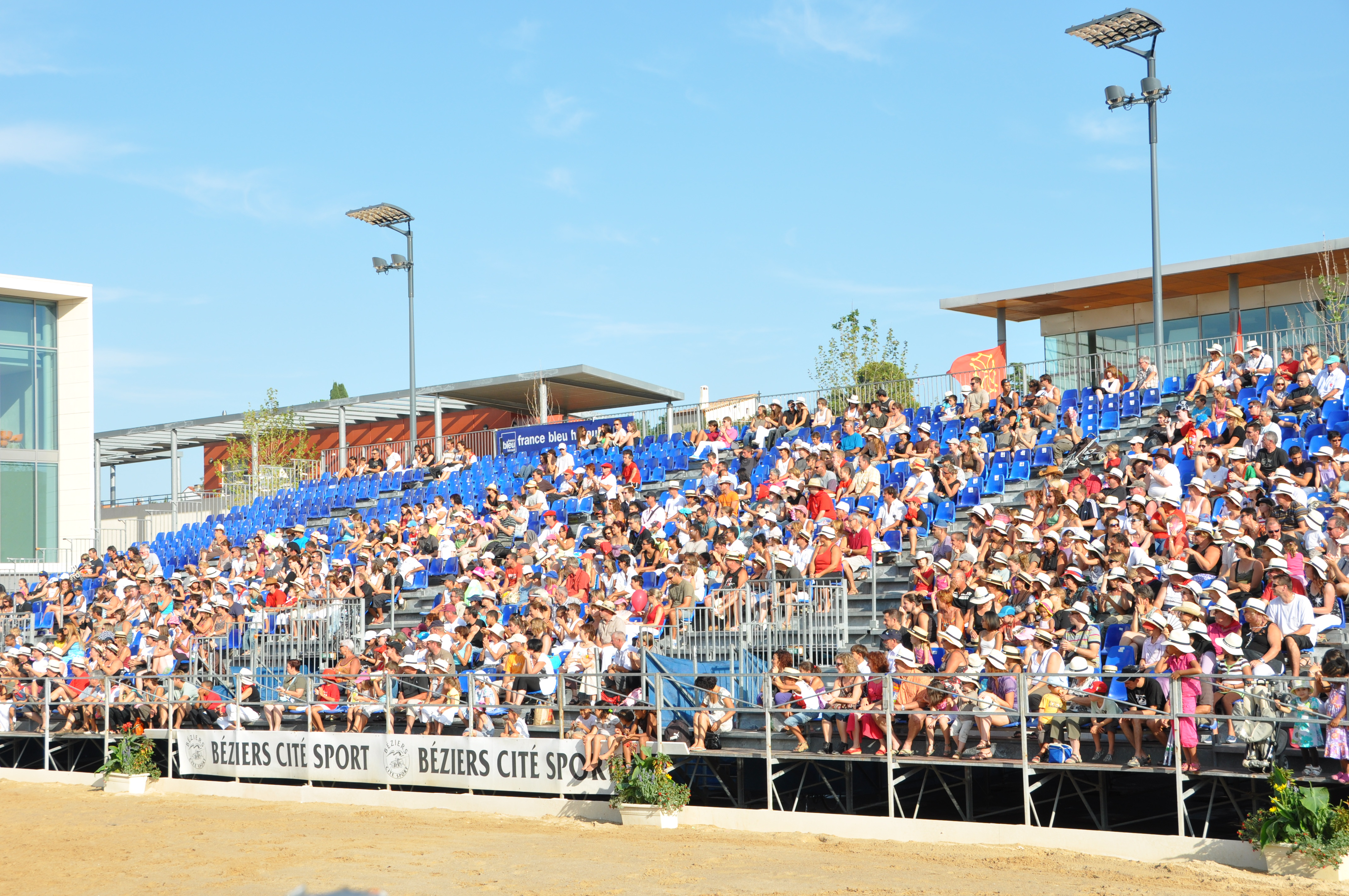 Une partie des arènes pendant la Feria de Béziers